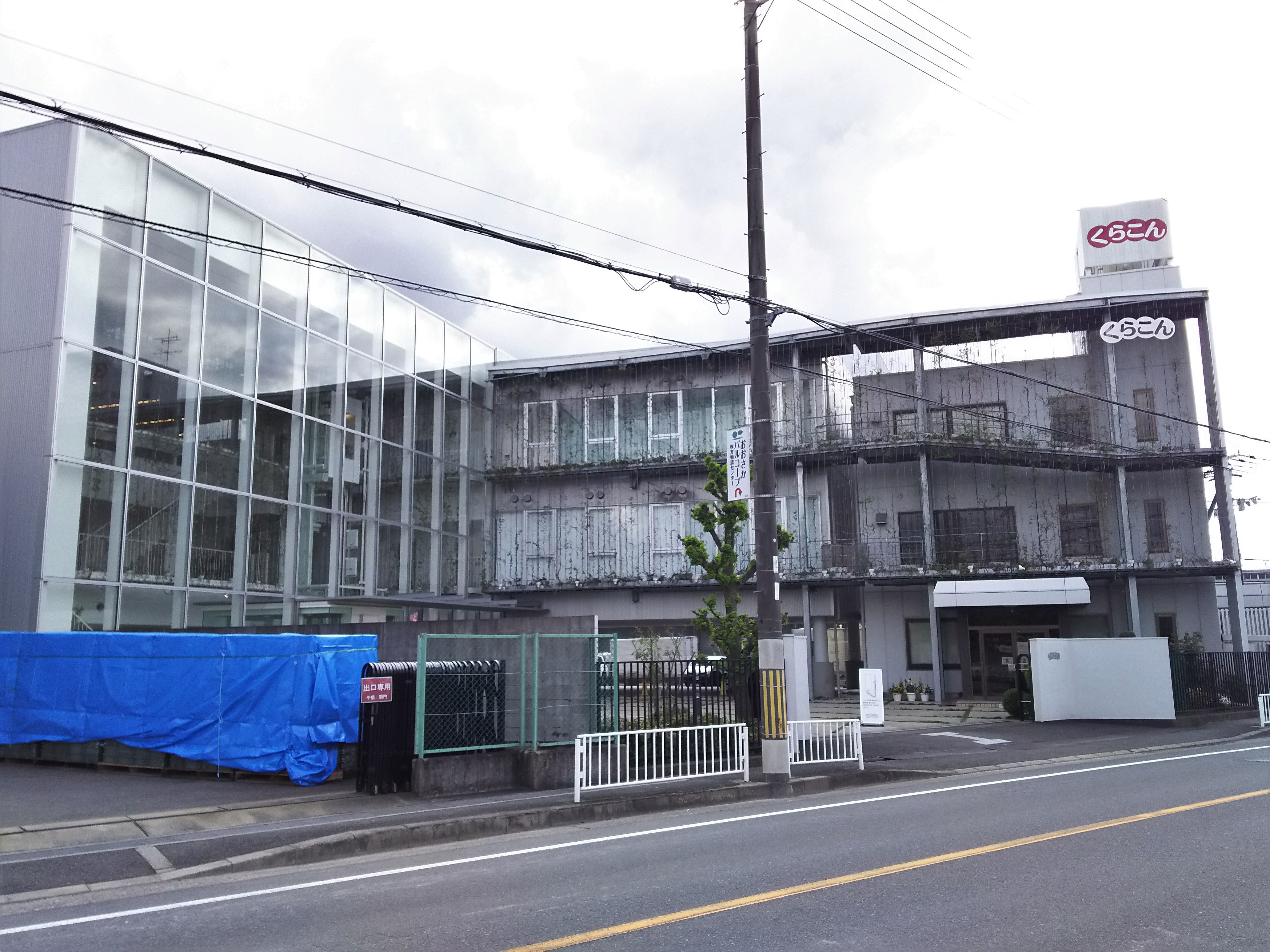 くらこんホールディングス本社（大阪府枚方市）